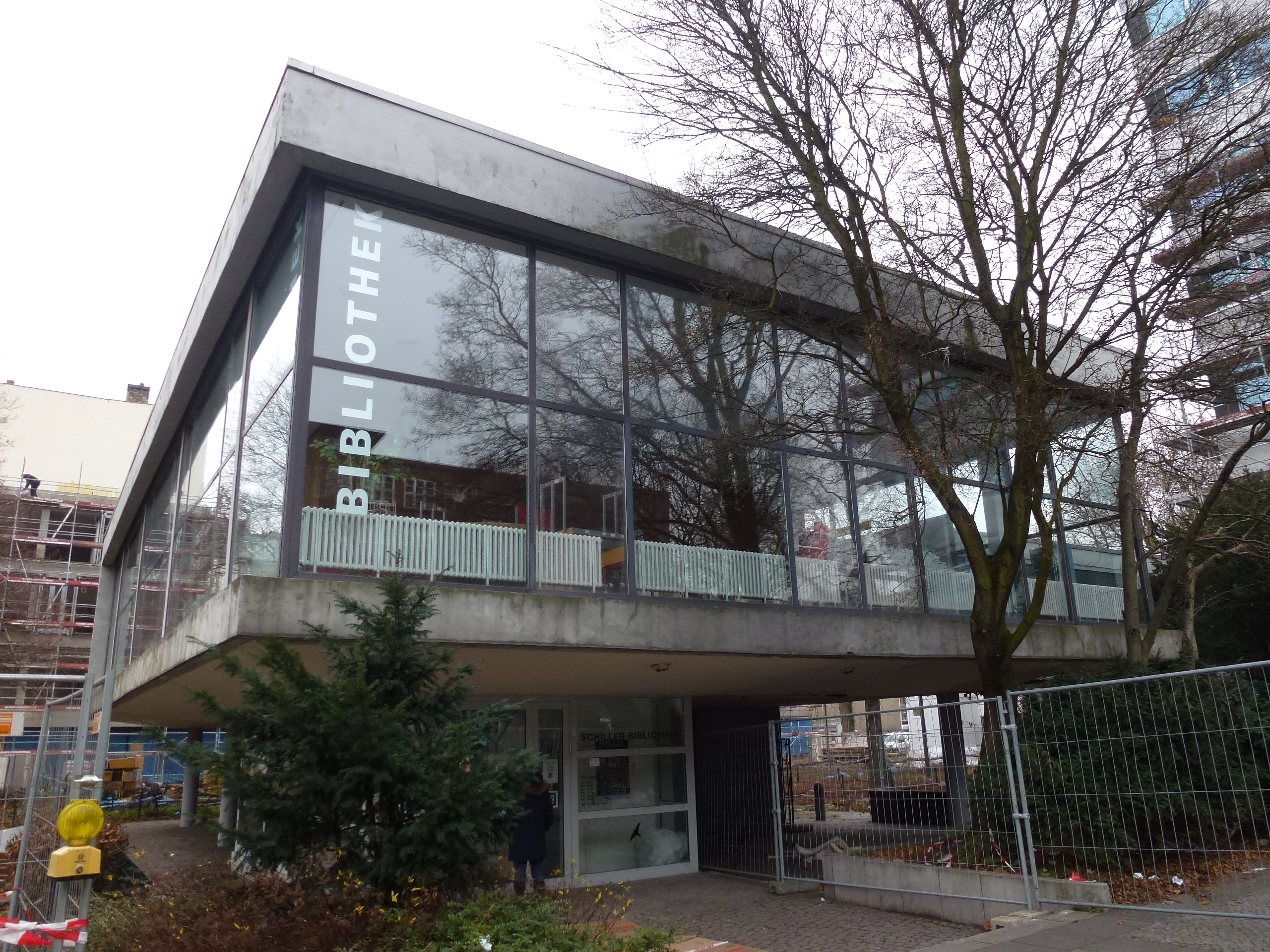 Rathaus Wedding Pavillon ehemals Schiller-Bibliothek